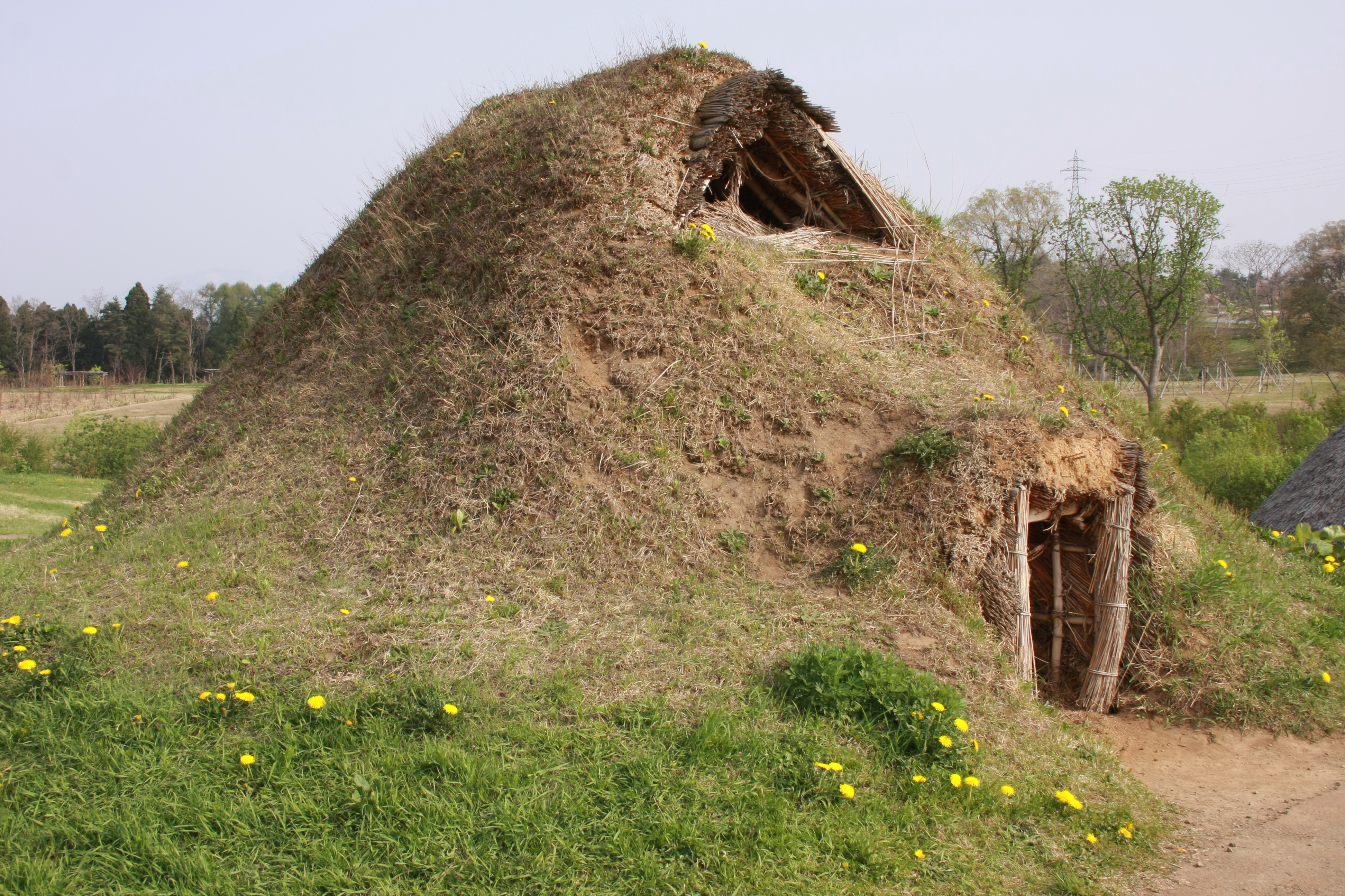 三内丸山遺跡復元土葺住居